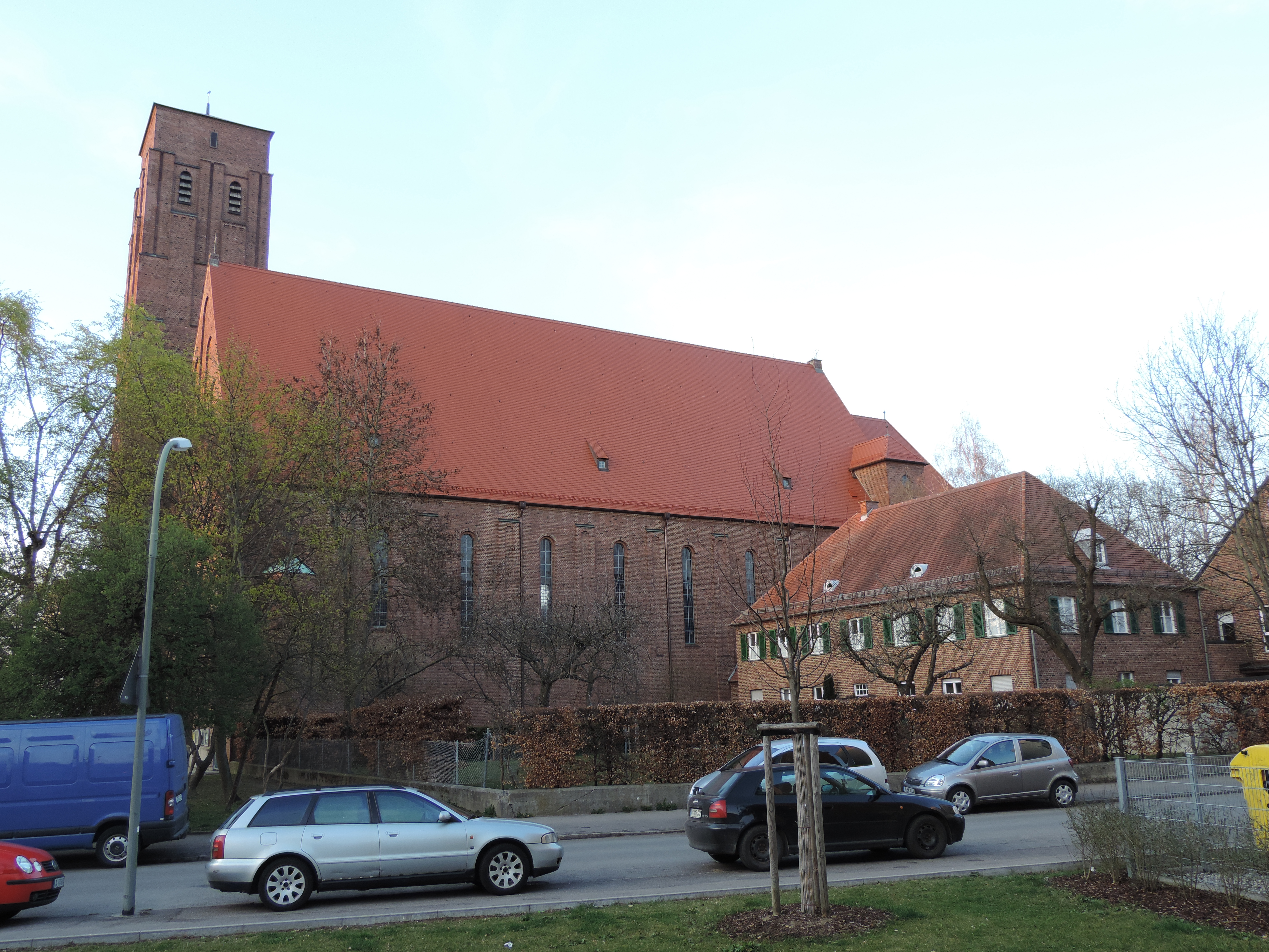 Südseite